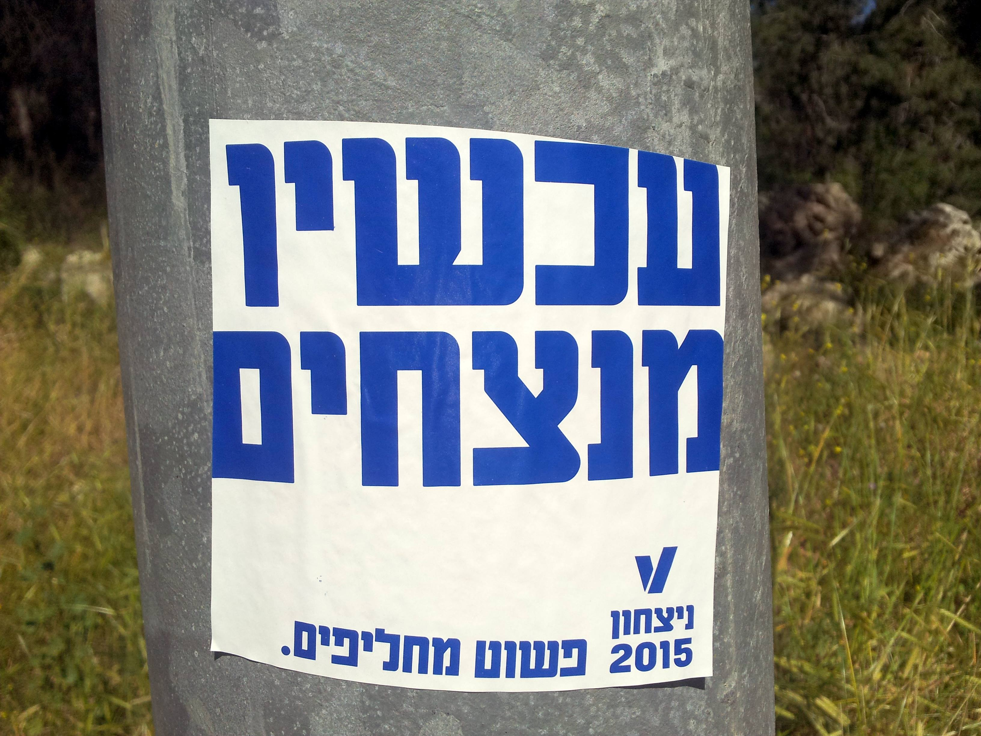 מדבקה של ארגון V15 ממערכת הבחירות 2015